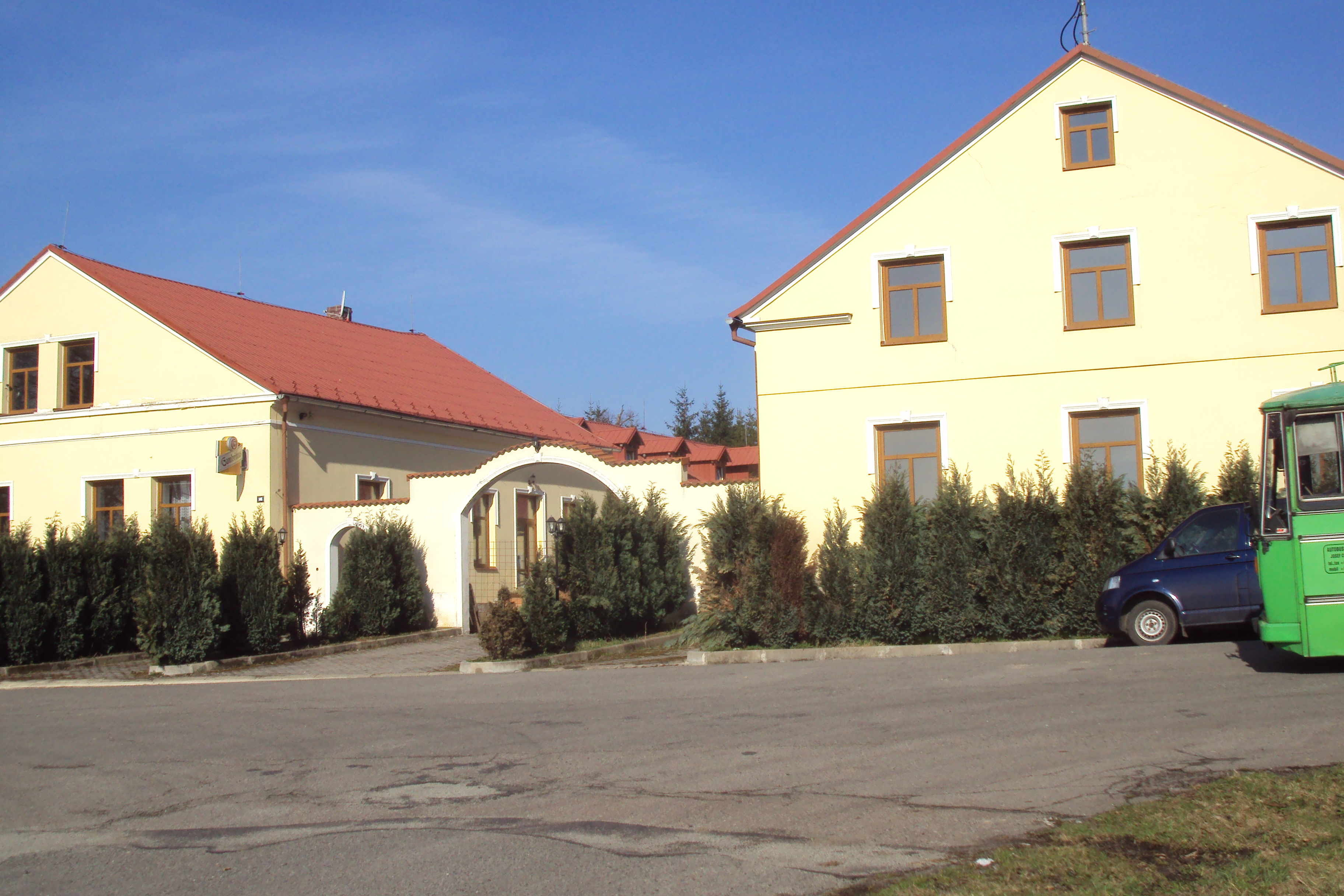 Samota Nová Huť v Lužických horách